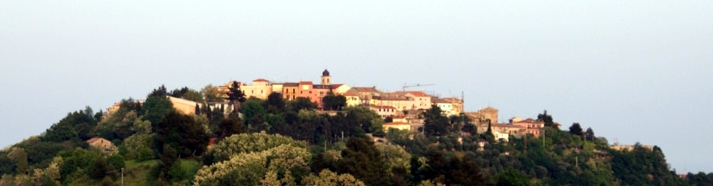 Vista panoramica di Montesicuro